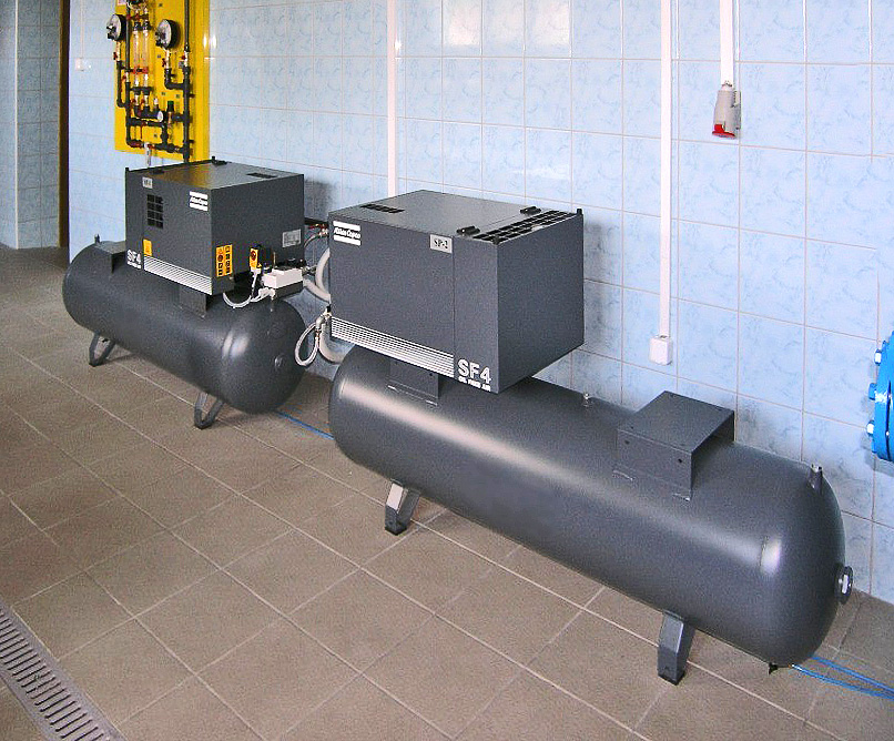 Atlas Copco Scroll compressor